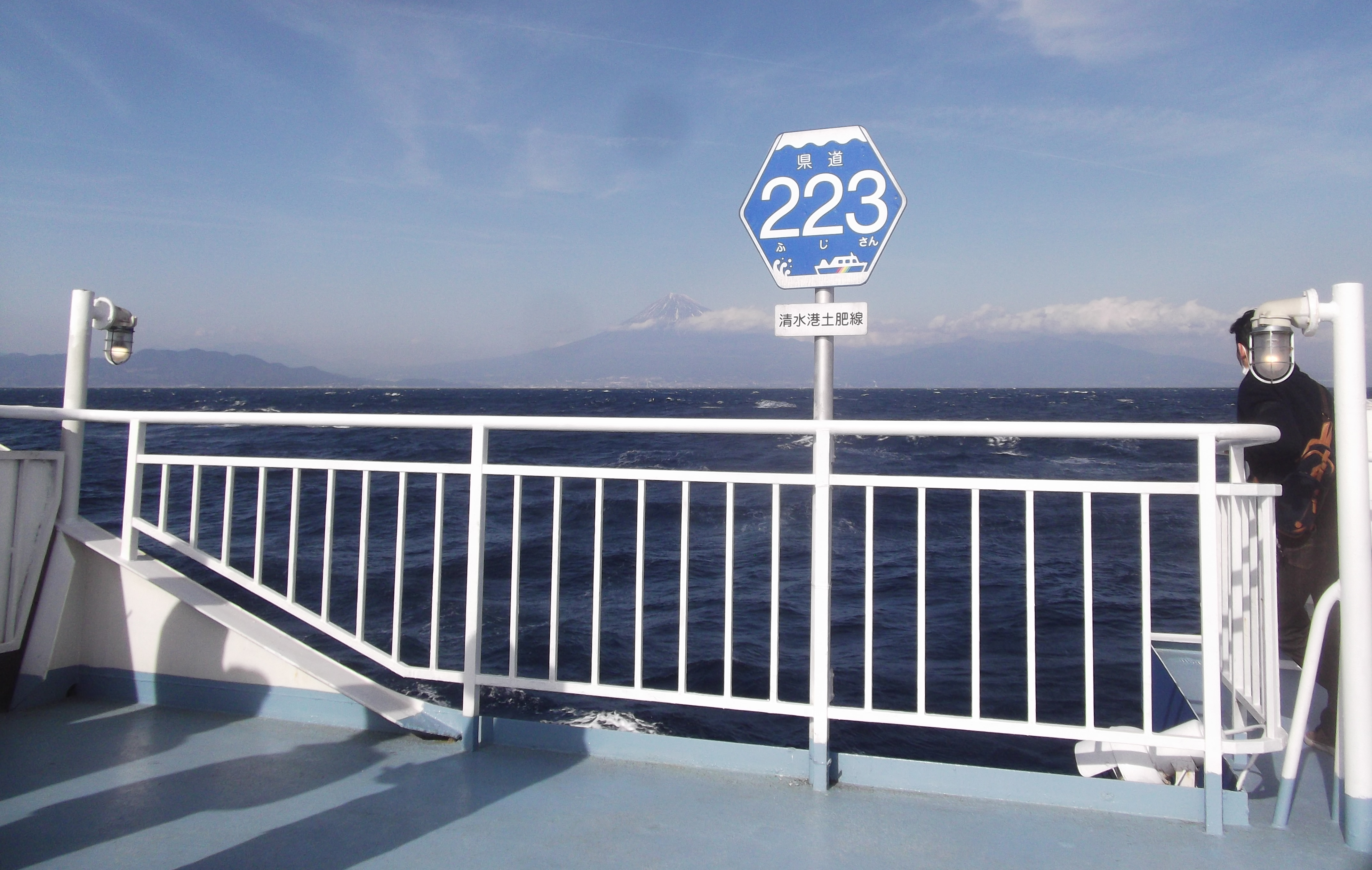 静岡県道223号清水港土肥線の標識。清水港から土肥までが指定されている。県道の標識は海上の代わりに、港とフェリーの甲板に設置されている。